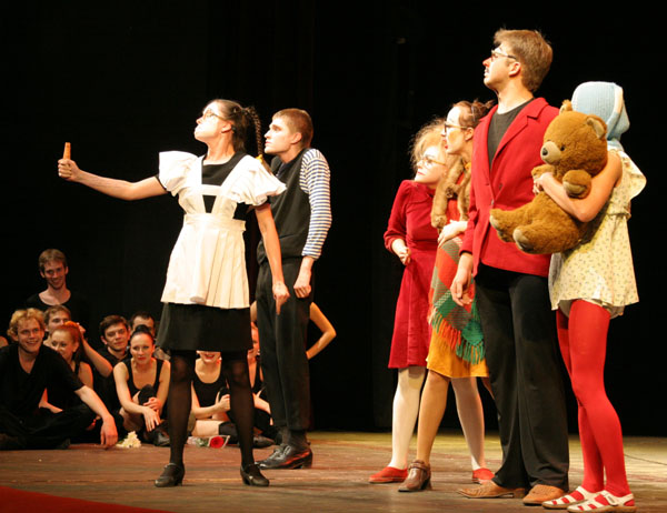 Студенческий Капустник на театральном факультете Саратовской консерватории